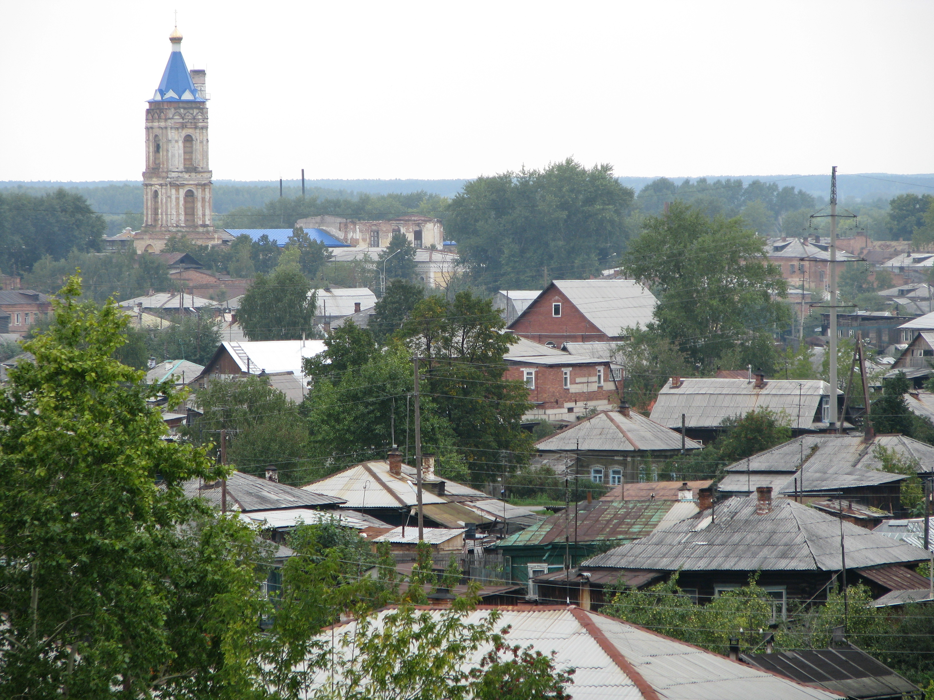 Сретенская церковь (Свердловская область, Ирбит, терр. автоприцеп. з-да)